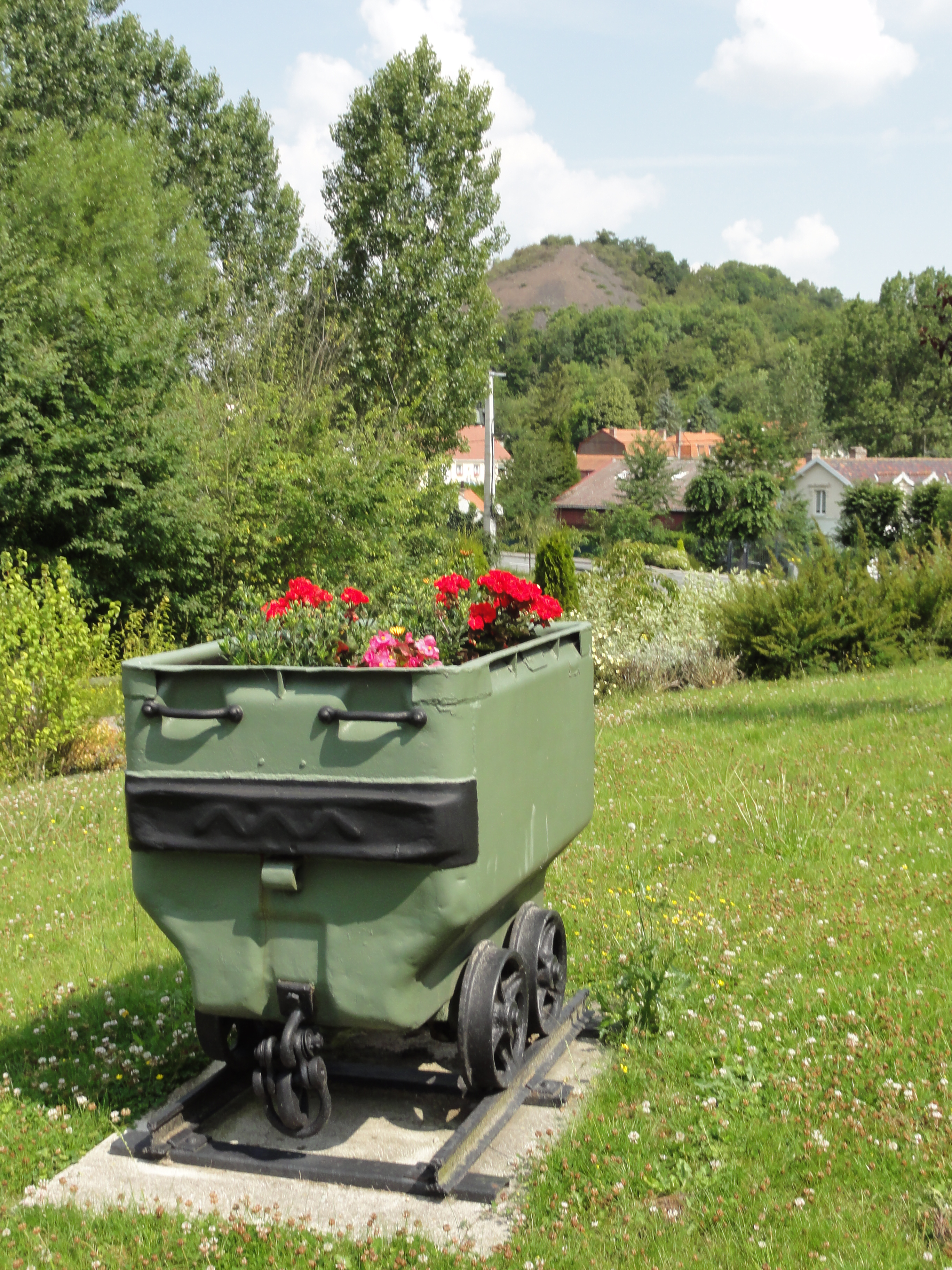 Terril n° 244 dit Fléchinelle Ouest, fosse n° 1 - 1 bis de la Compagnie des mines de Ligny-lès-Aire dans le bassin minier du Nord-Pas-de-Calais, Enquin-les-Mines, Pas-de-Calais, Nord-Pas-de-Calais, France. Le terril no 244 est inscrit sur la liste du patrimoine mondial de l'Unesco le 30 juin 2012 et y constitue le site no 109.